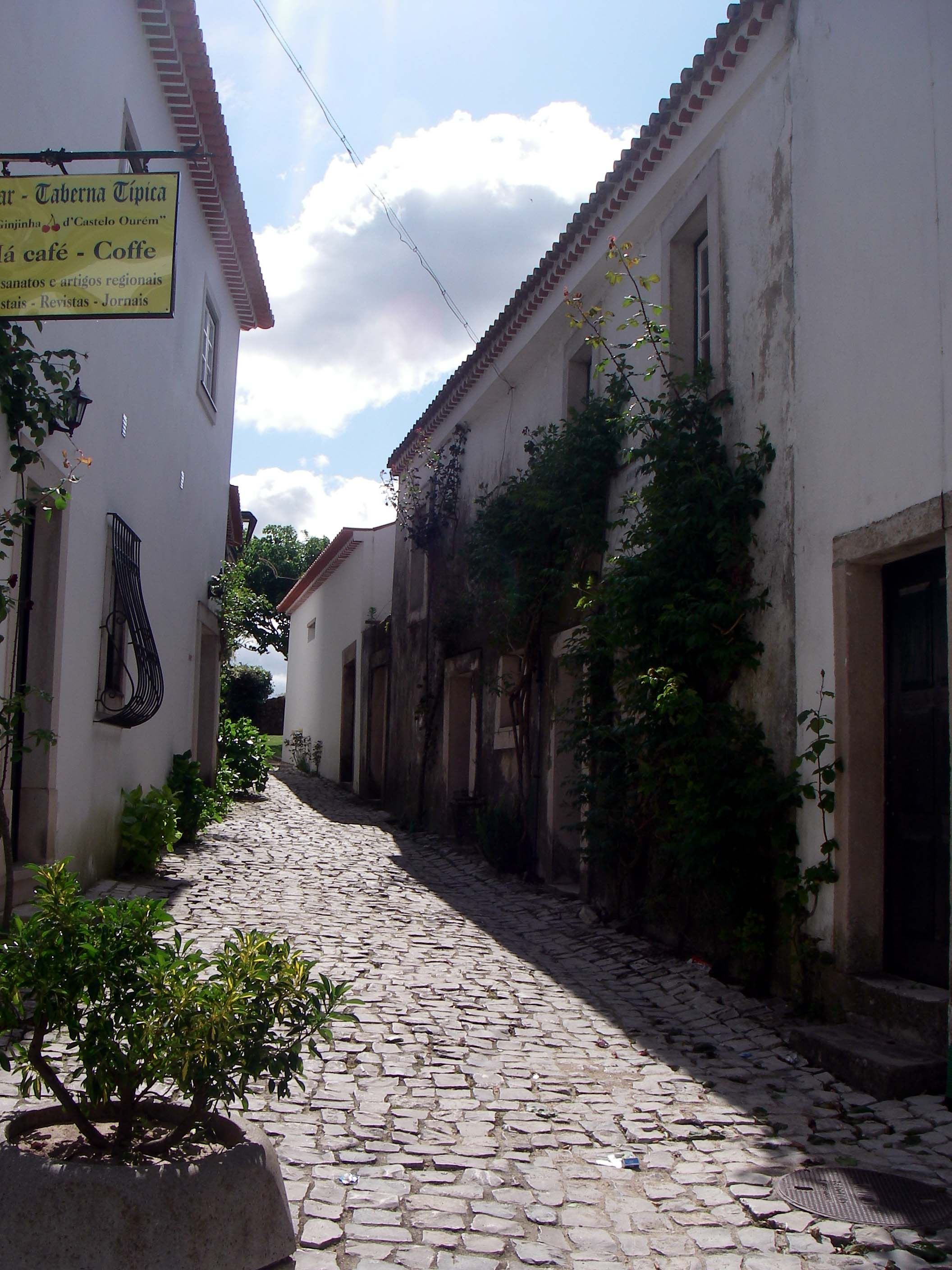 Castelo de Ourém This file was uploaded for Wiki Loves Monuments in Portugal with the unique identifier 69874.